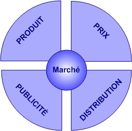 Plan de marchéage, les 4P. Auteur: Greudin (Discuter) Licence